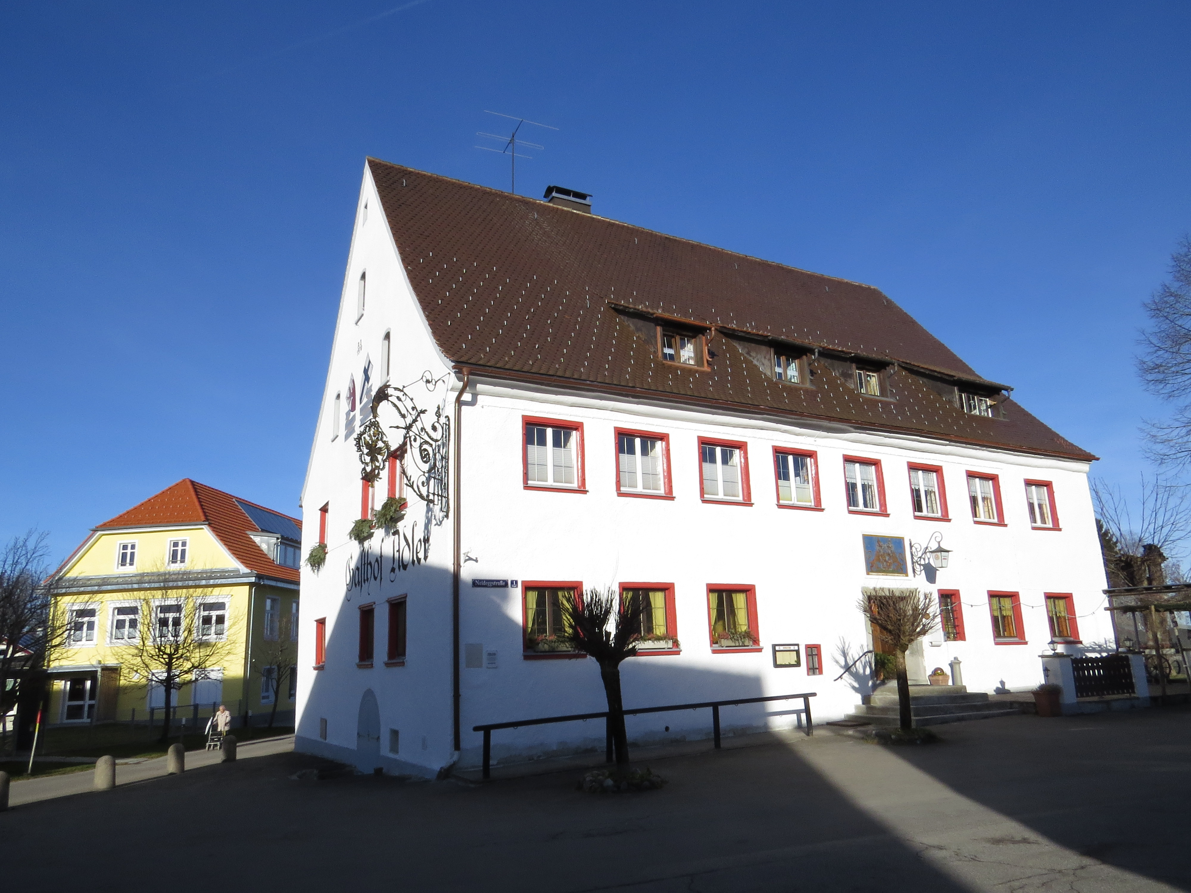 Neideggstr. 1 in Ellhofen, Weiler-Simmerberg